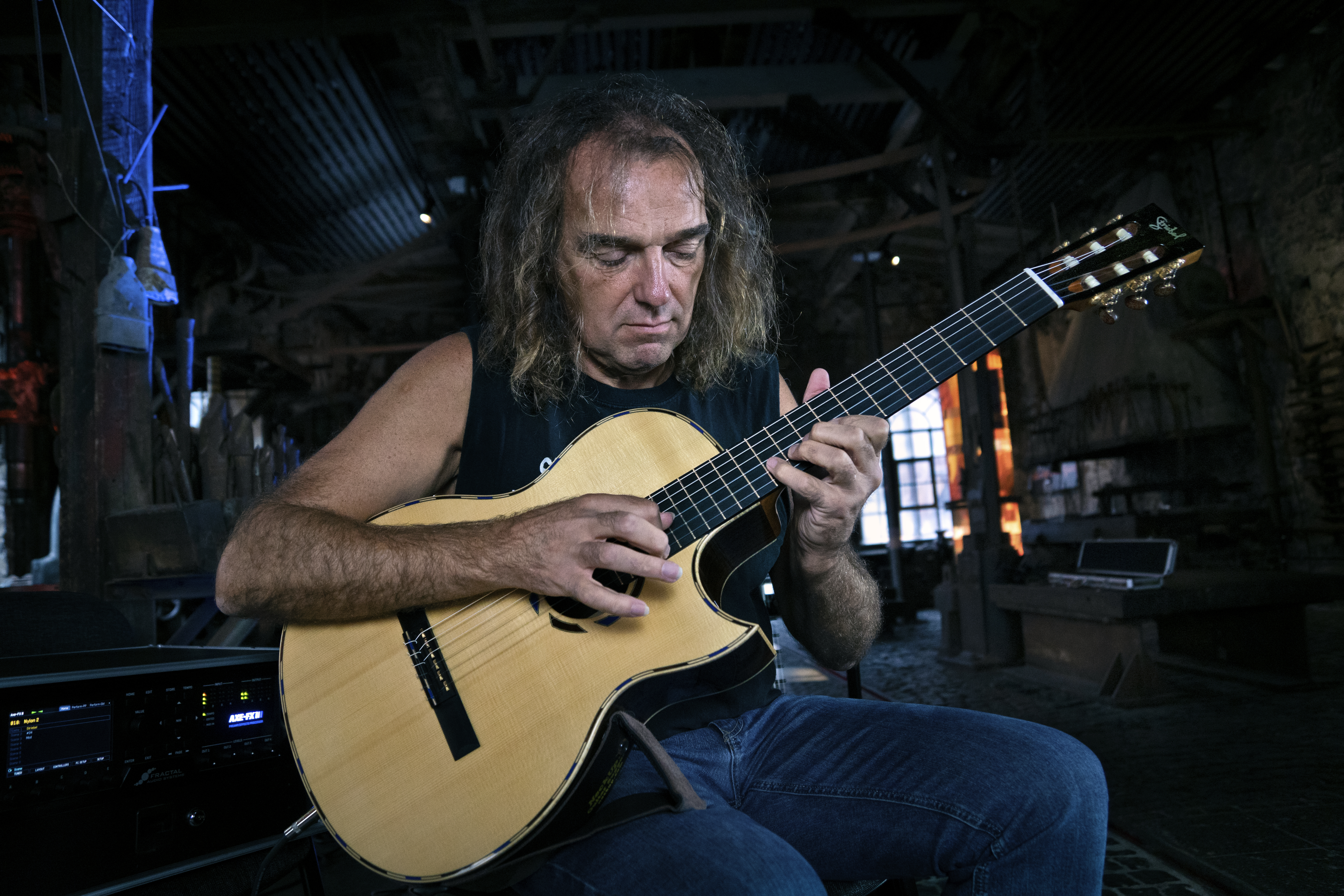 Peter Autschbach @ Stöffel-Park, Enspel, 01.10.2019